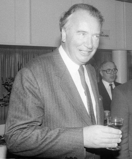 im Schloss. Im Bild v.l. Friedrich Wilhelm Räuker, Intendant des NDR, Landesfunkhausdirektor Günther Pipke und Ministerpräsident Gerhard Stoltenberg.